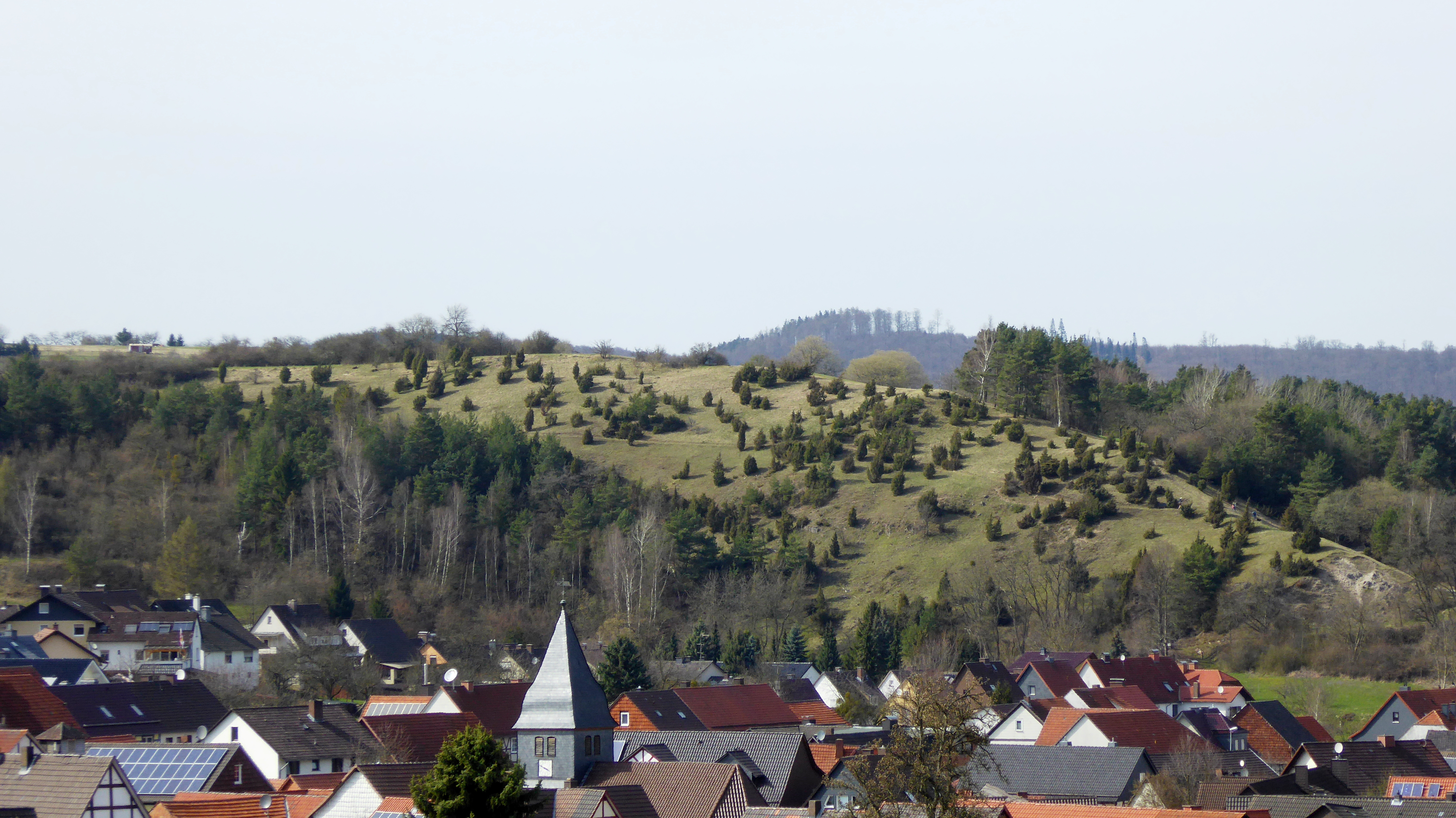 Blick von Südosten auf ein Teilgebiet des Naturschutzgebietes "Kalkmagerrasen bei Roßbach", Werra-Meißner-Kreis, Hessen. Vorne im Bild der Ort Roßbach